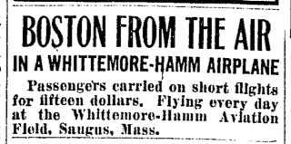 Advertisement, Boston, Massachusetts, USA